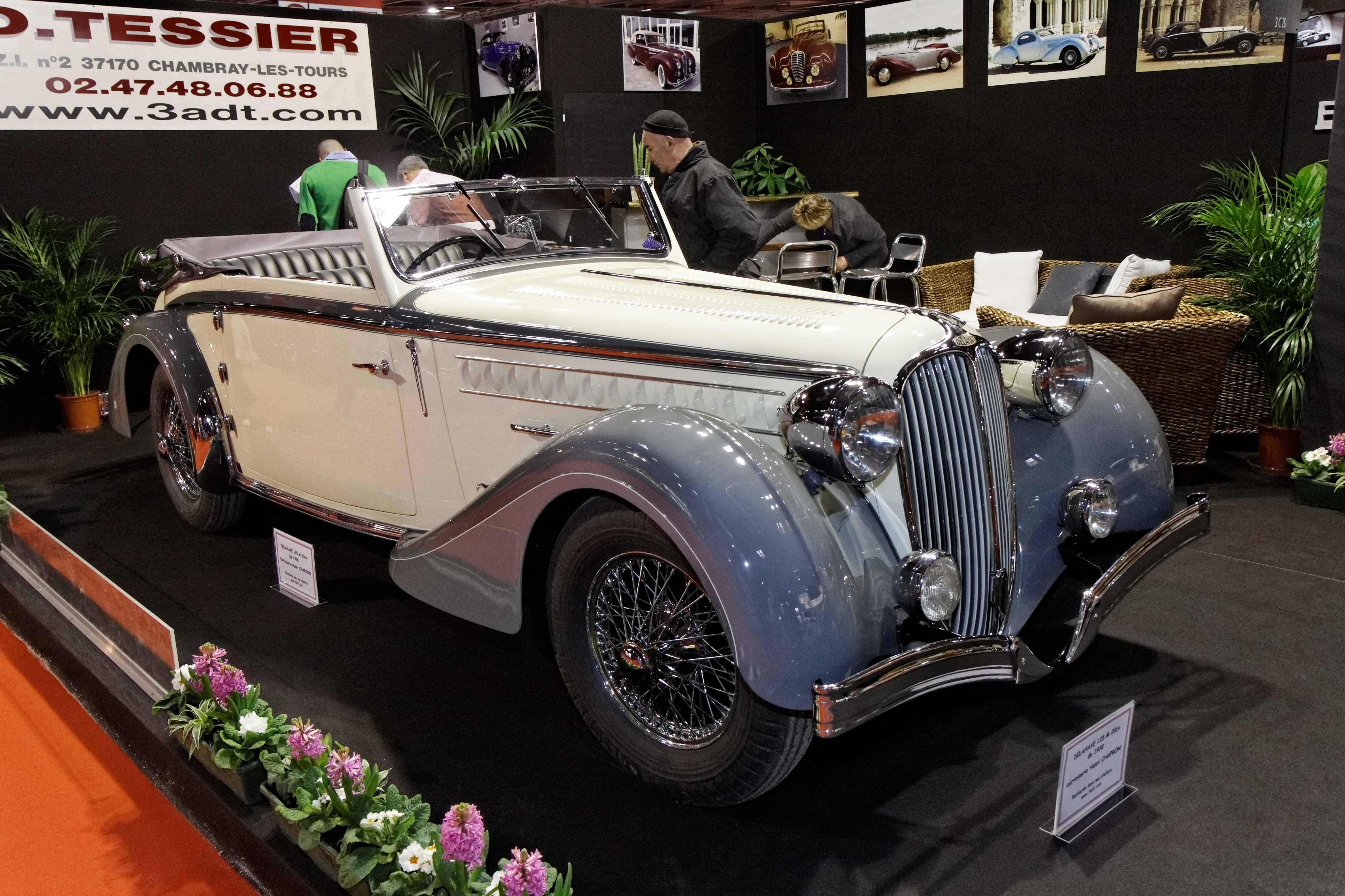 Delahaye 135 M Chapron